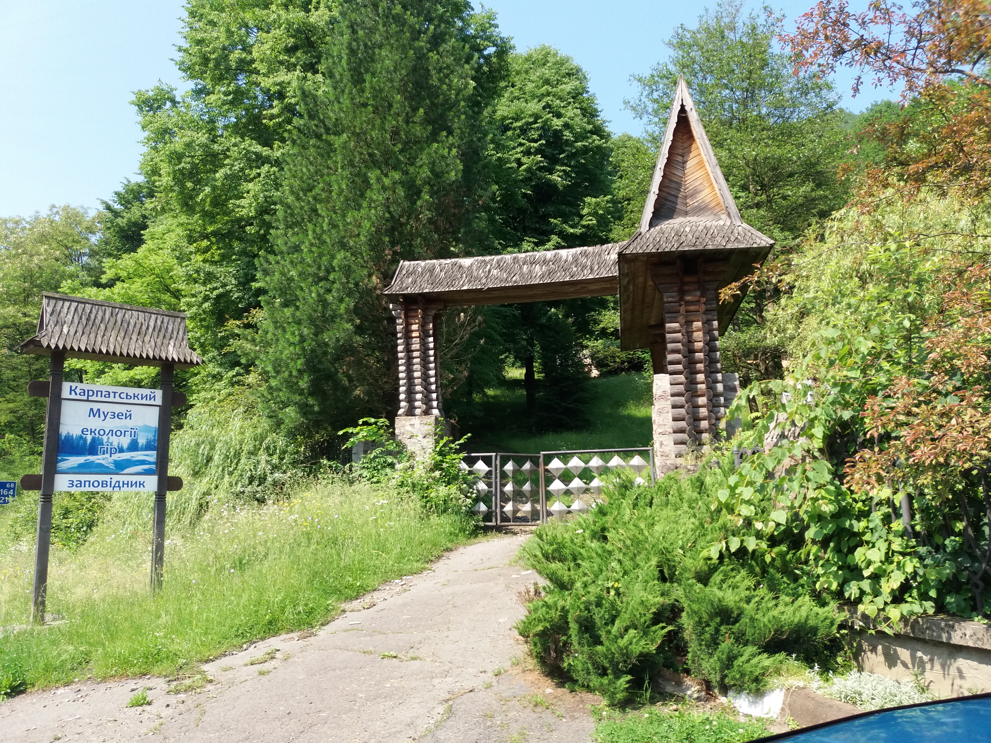 Музей екології гір. Карпатський біосферний заповідник.